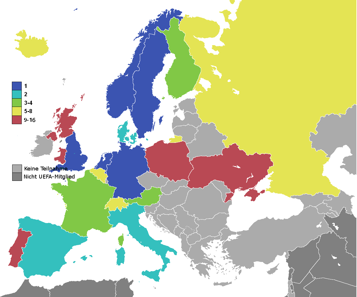 Bestes Abschneiden der Nationalmannschaften bei der Fußball-Europameisterschaft der Frauen